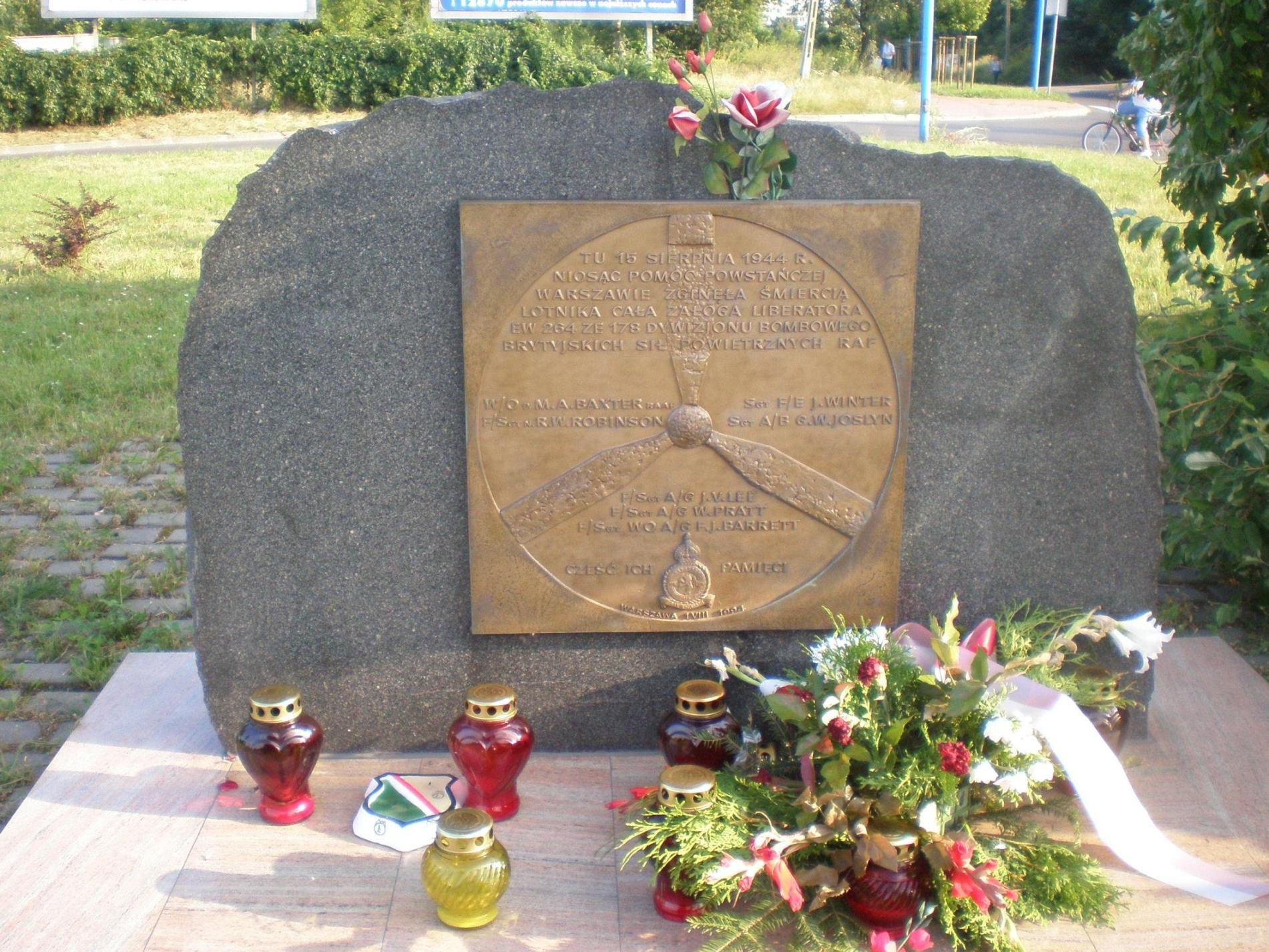 Kamień upamiętniający lotników brytyjskich poległych w zestrzelonym samolocie 15 sierpnia 1944 roku, który spadł w rejonie dzisiejszego ronda Zesłańców Syberyjskich, ul. Szujskiego oraz al. Bohaterów Września.